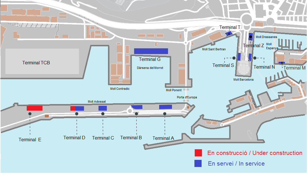 Terminals de passatgers del Port de Barcelona